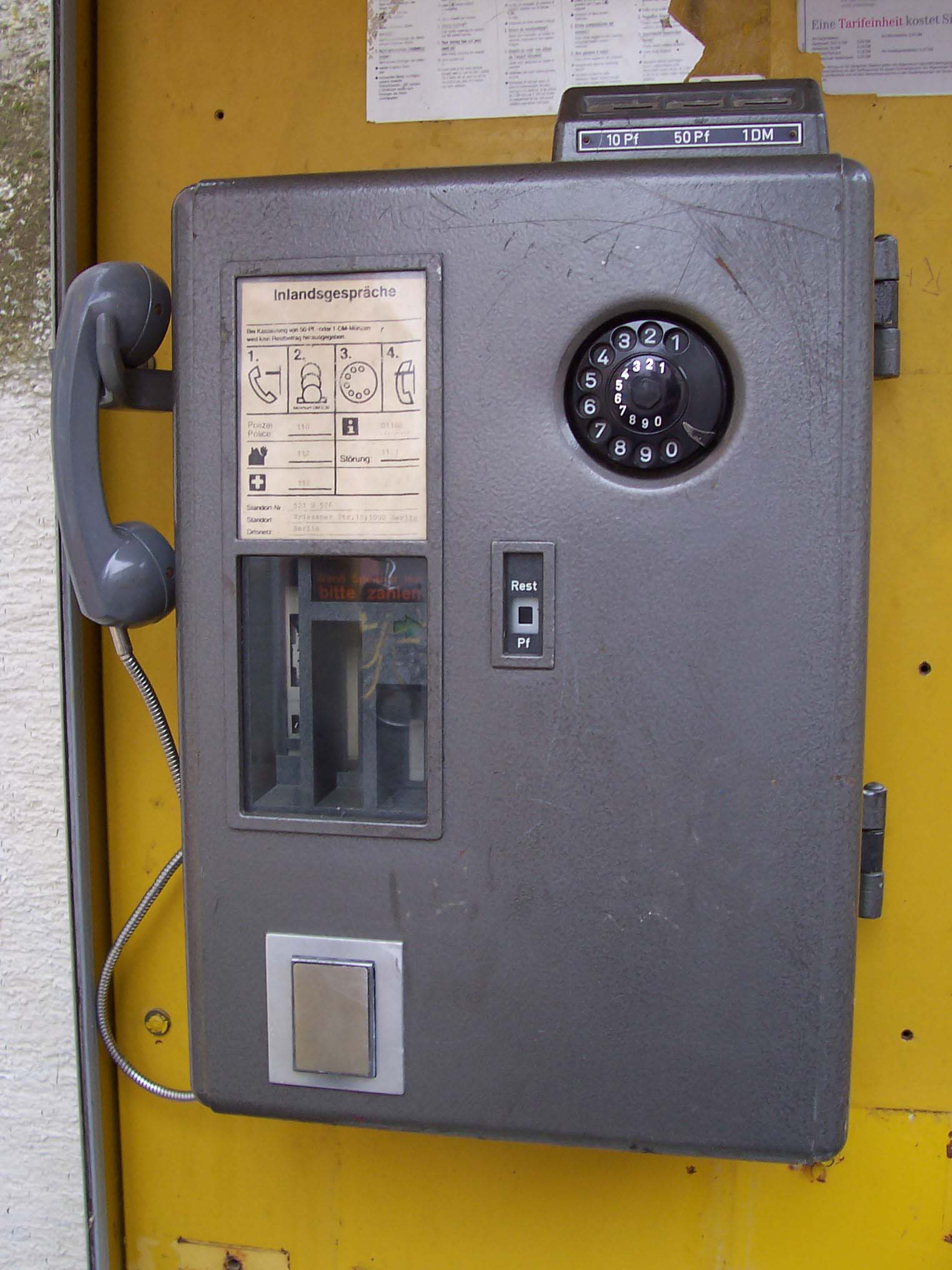 Münz-Telefon-Apparat mit Wählscheibe aus "Bundespost-Zeiten" Standort: Postmuseum in Erbes-Büdesheim aufgenommen von Benutzer:Kandschwar am 11. September 2005